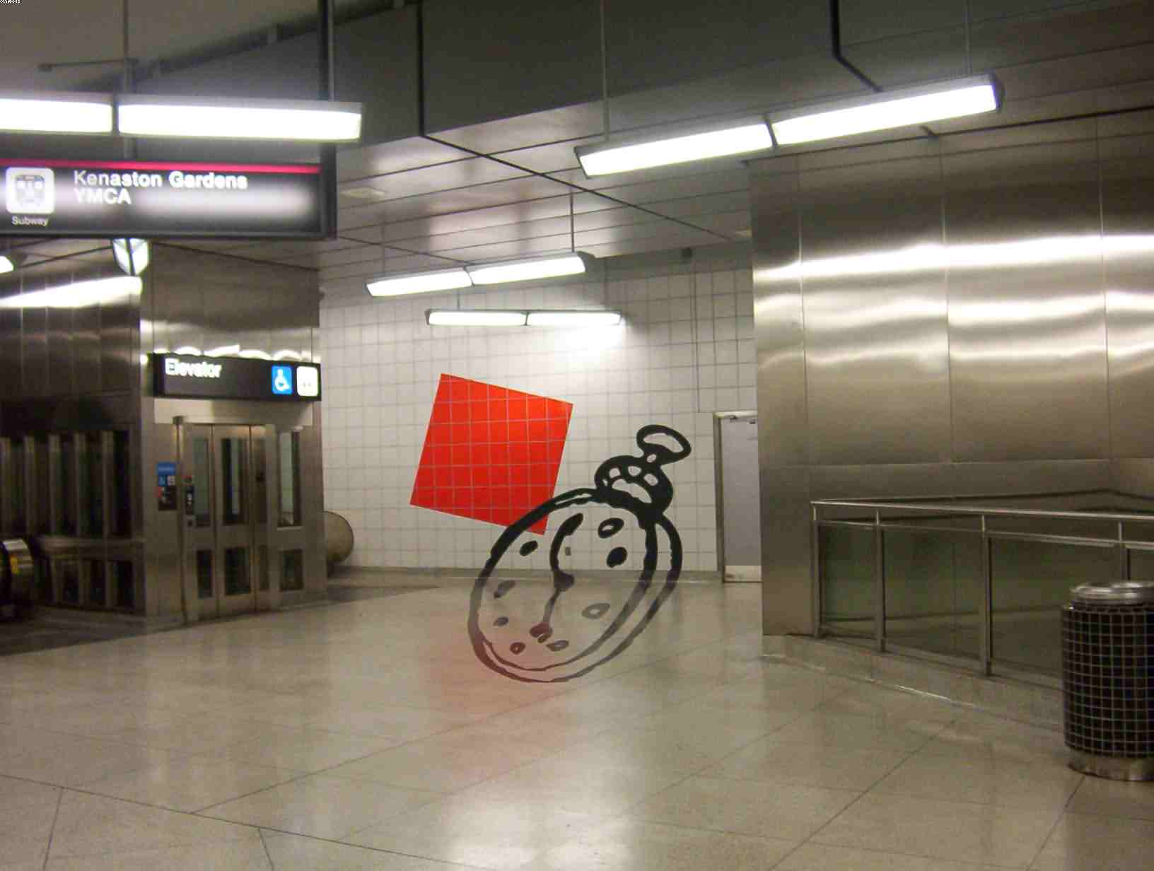 Aardvark114,2005